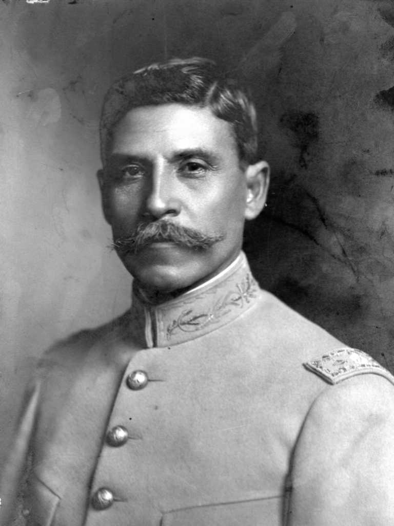 Fotografía familiar del General de División Fermín Carpio